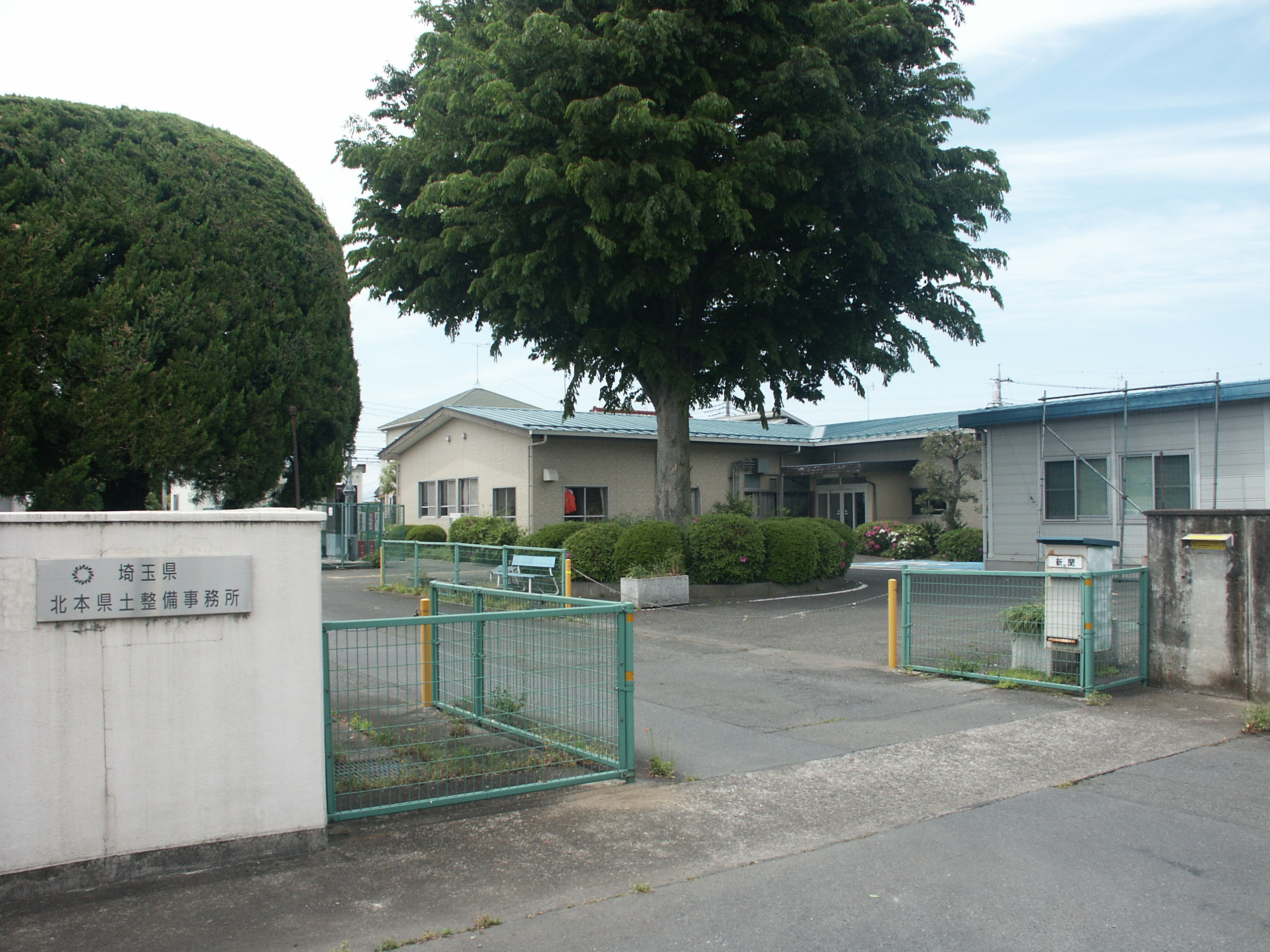 埼玉県北本県土整備事務所庁舎